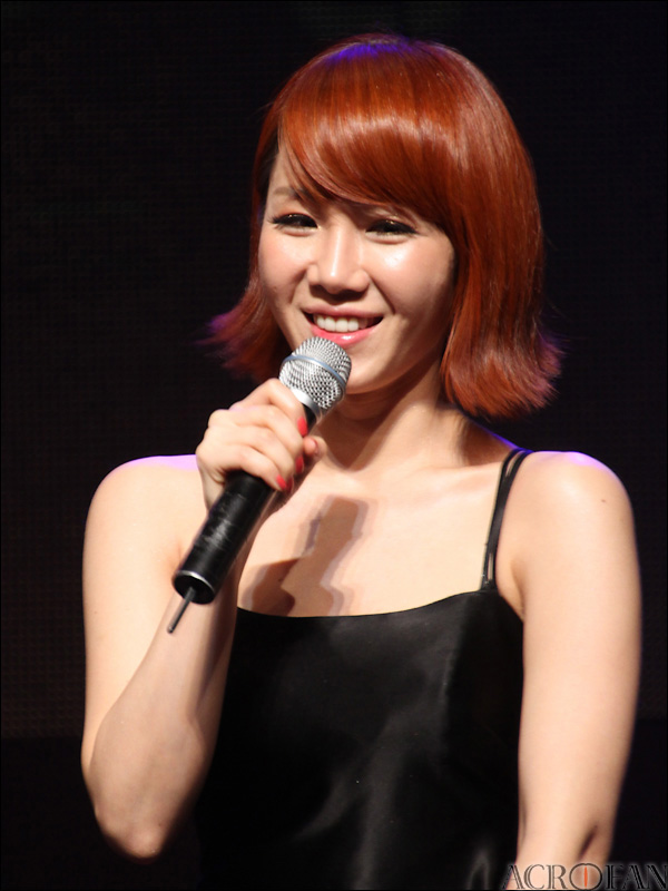 tvN '오페라스타 2011' 쇼케이스